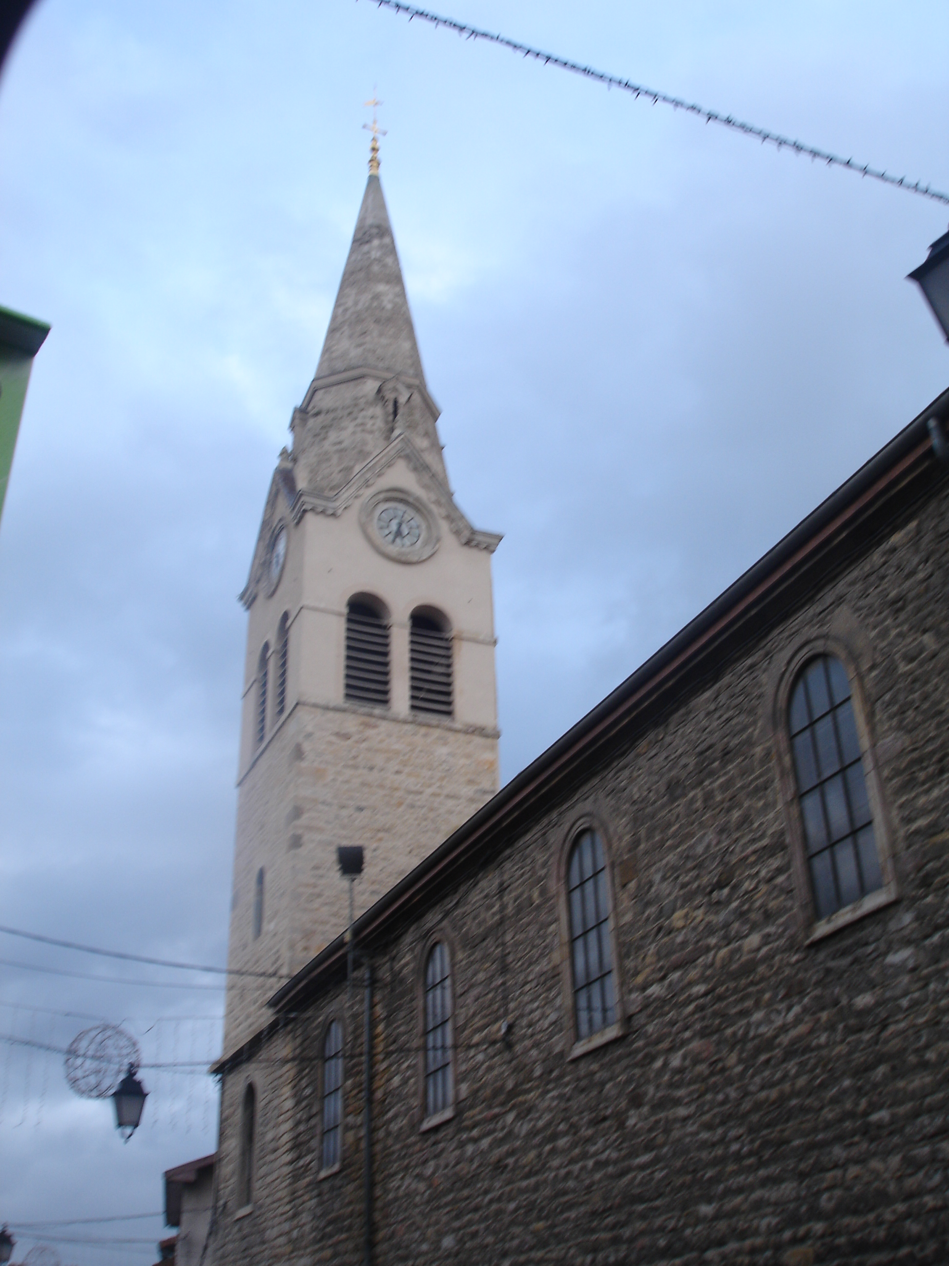 La Verpillière (38) : L'église